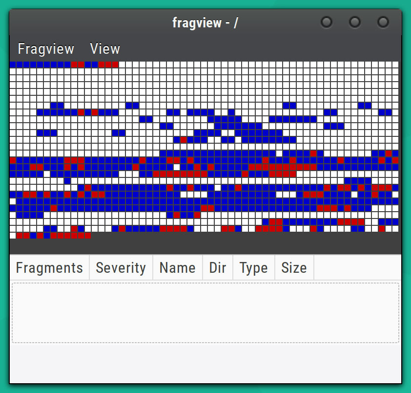 NILFS2 Ringspeichereffekt